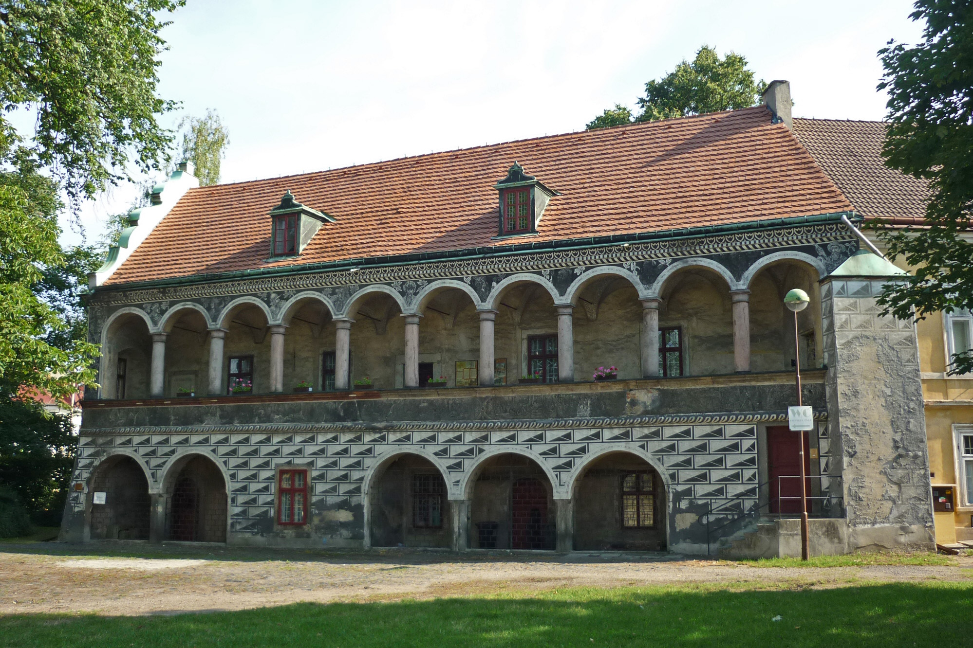 Rotes Haus in Böhmisch Leipa (Česká Lípa)